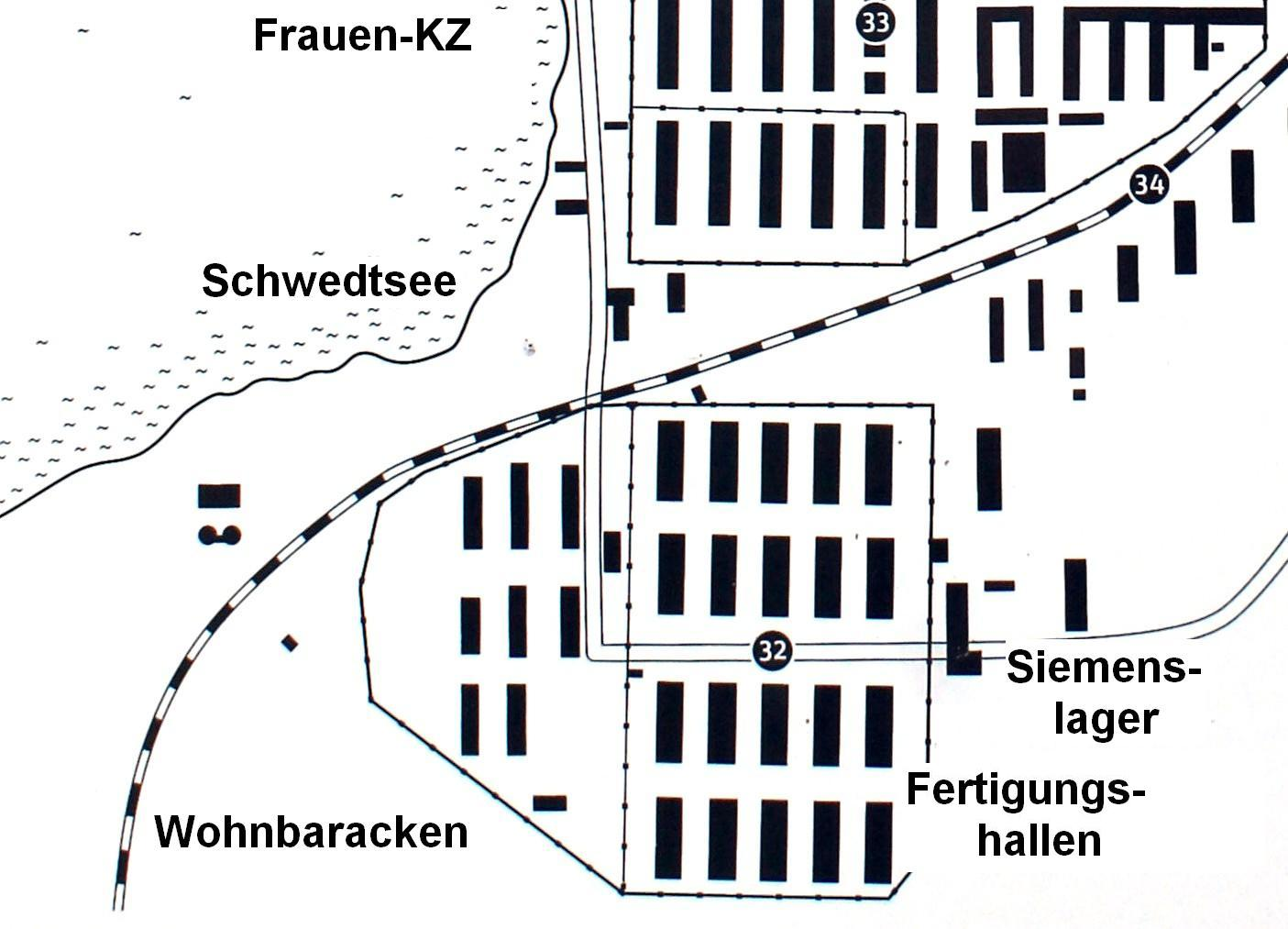 Ausschnitt aus dem Lageplan vom KZ-Ravensbrück, Darstellung des Siemenslagers